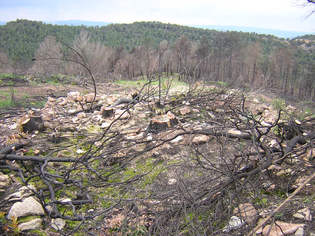 Restes del mas Puigllobató (Monistrol de Calders, Moianès)